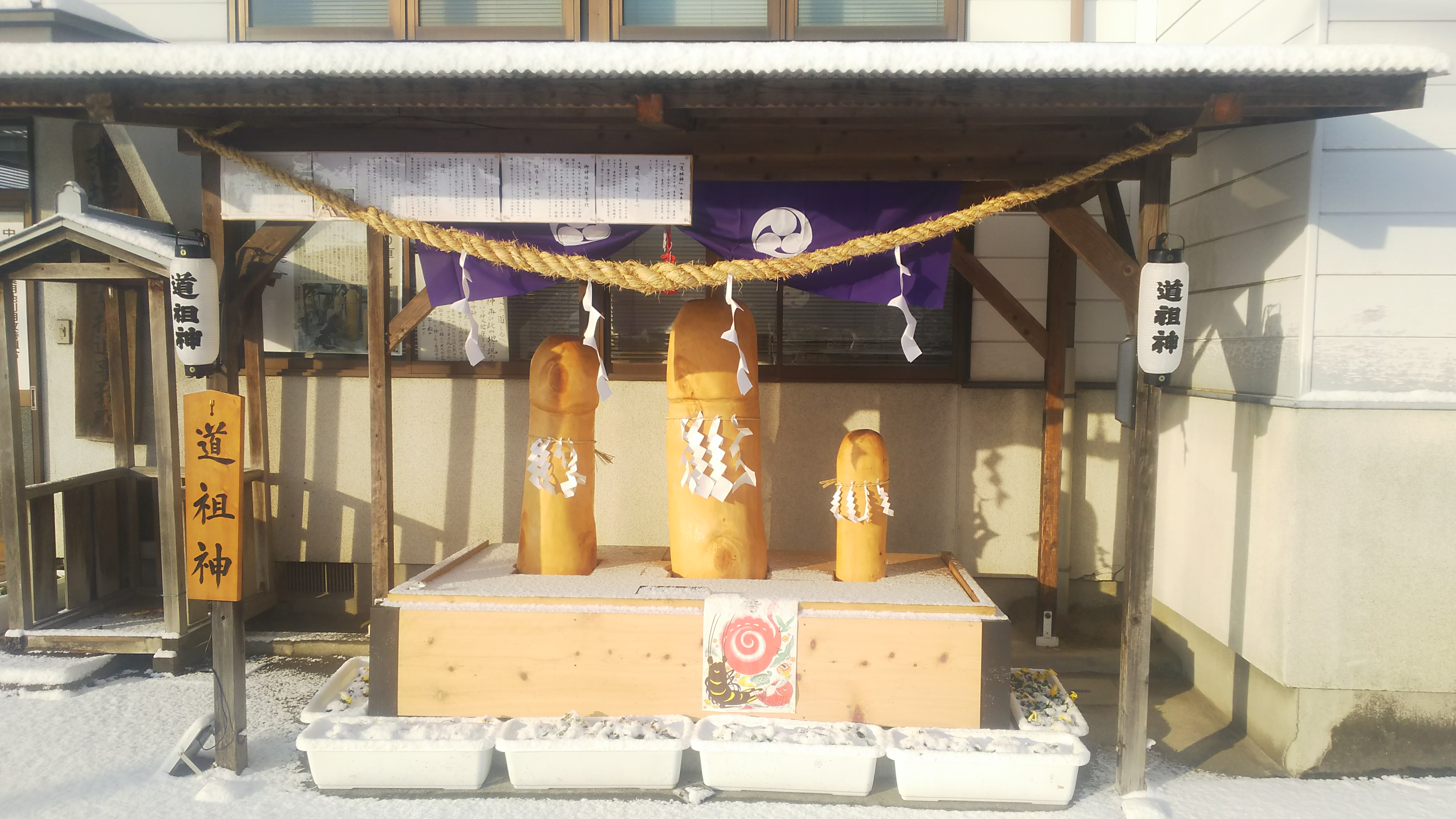 道祖神の地名となっているこの地に、仙台市広瀬通拡張工事に伴い伐採されたイチョウの木を譲り受け、新たに製作されたご神体。